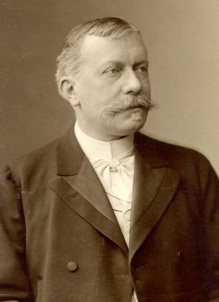 Fotografie von Prof. Dr. phil. Wolf Wilhelm Graf von Baudissin